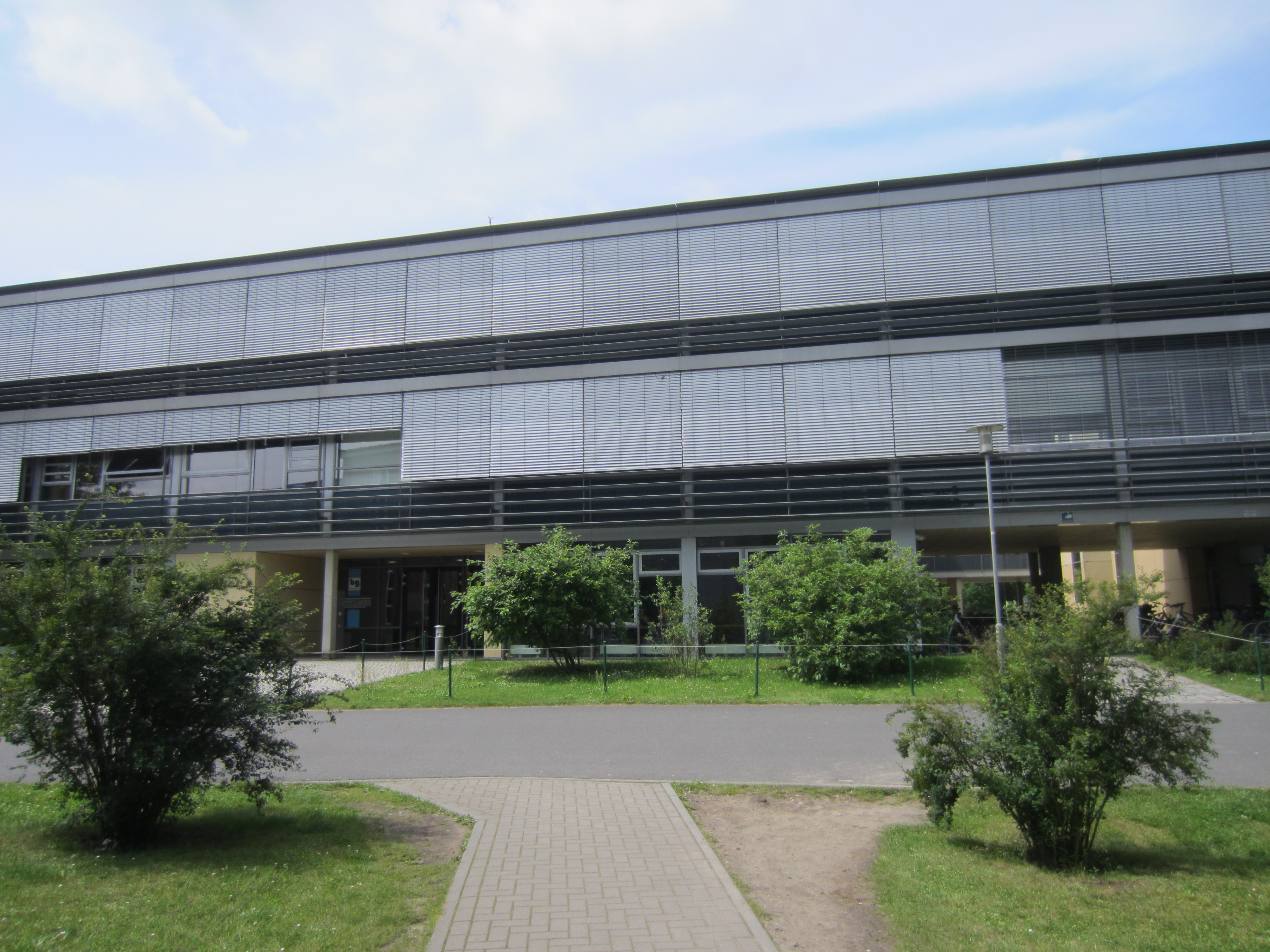 Teilansicht des barnim-gymnasium